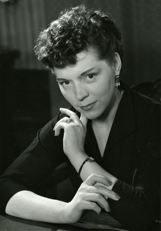 Skådespelaren Harriet Hedenmo i Mord per telefon på Helsingborgs stadsteater